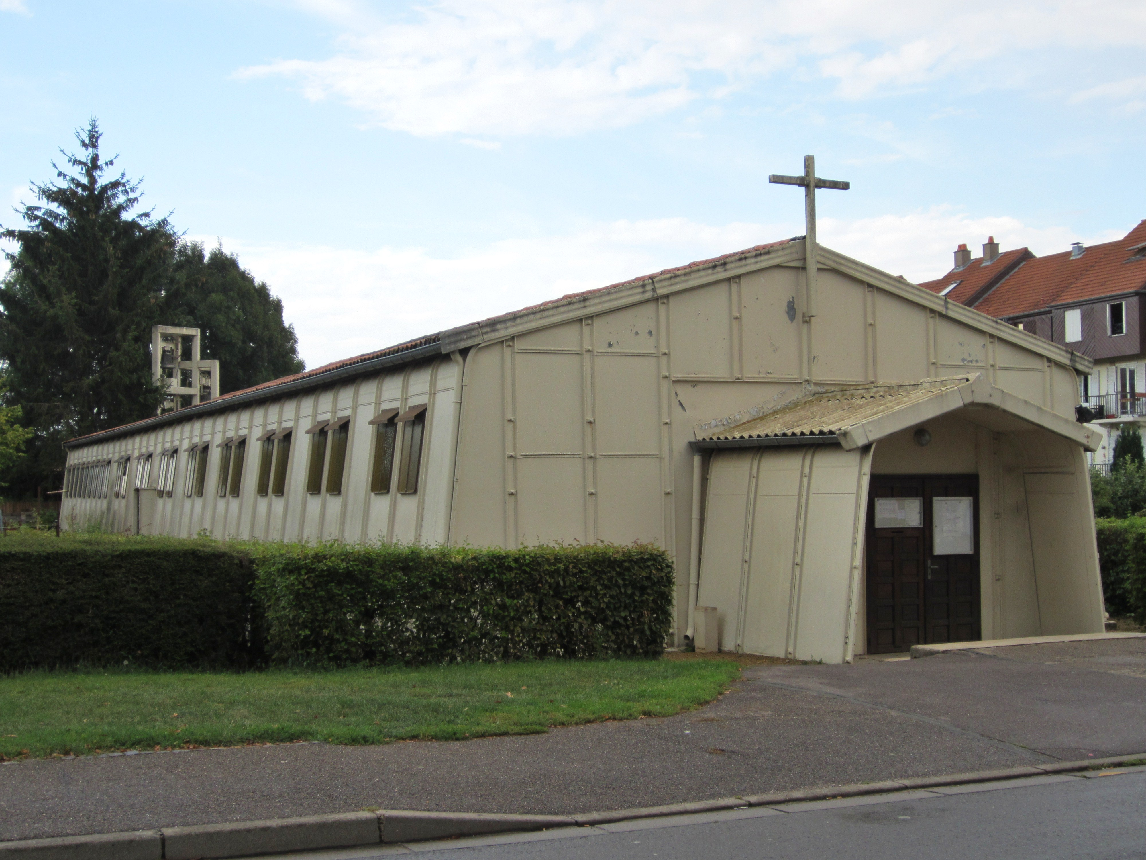 Eglise 4 bornes Woippy